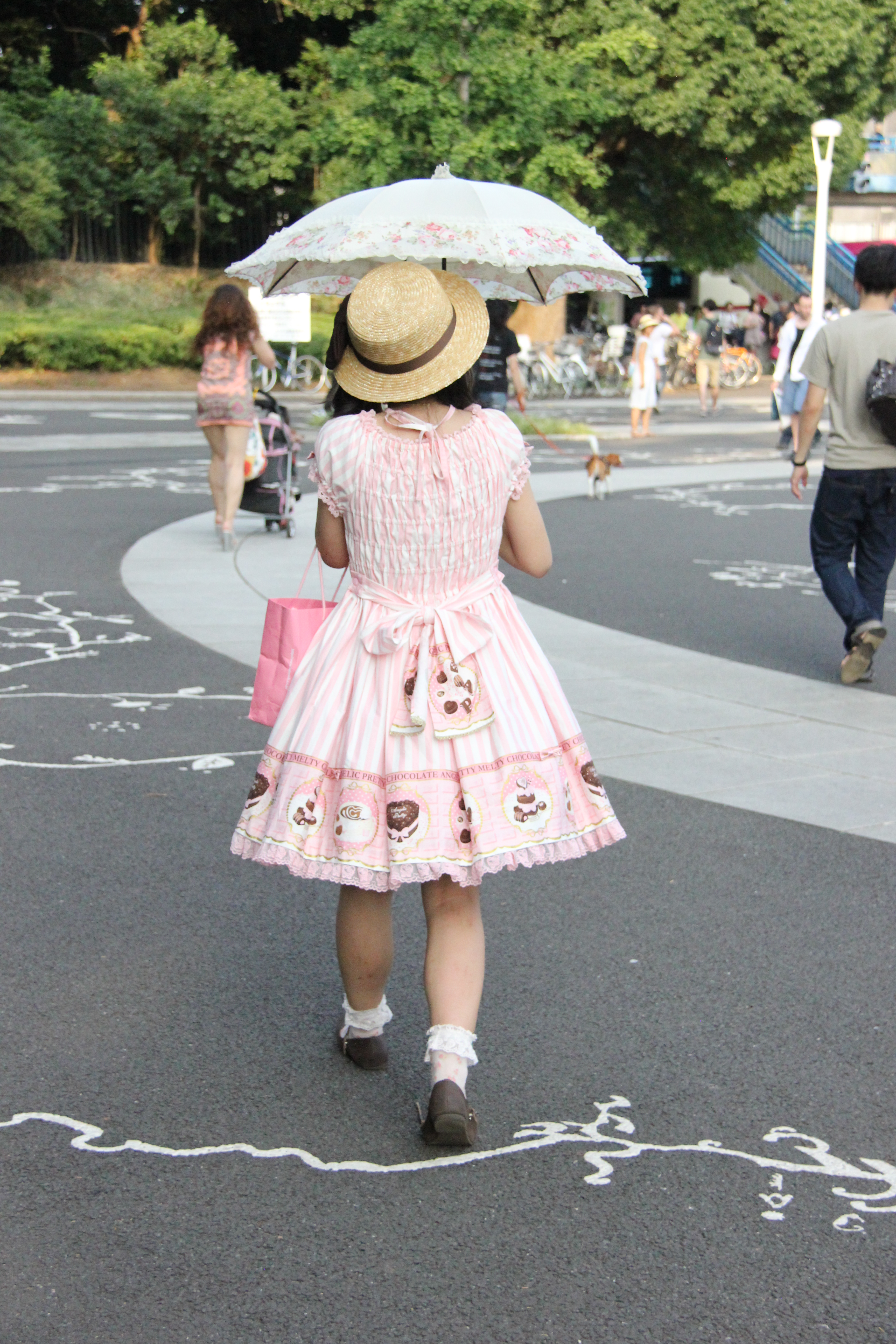 Yoyogi Lolita